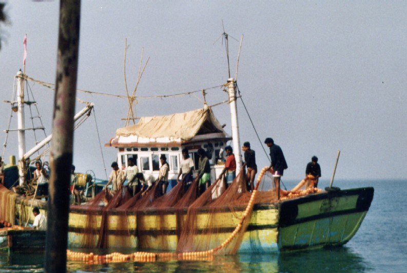 Rybolov před pobřežím Goi